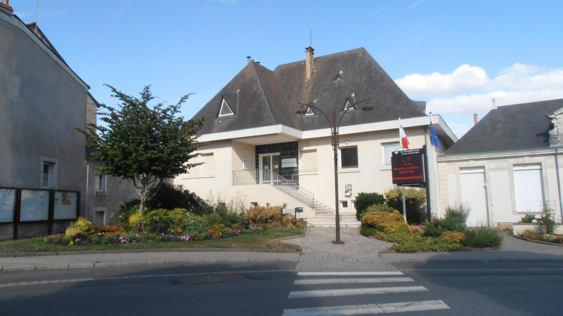 La mairie de La Pommeraye (Maine-et-Loire, France).